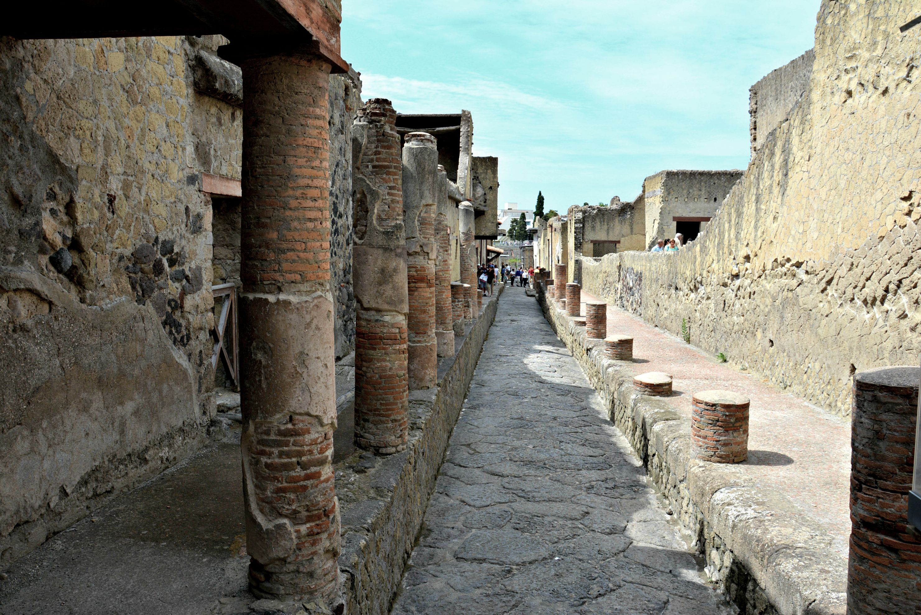 Cardo IV - MIBAC This is a photo of a monument which is part of cultural heritage of Italy.